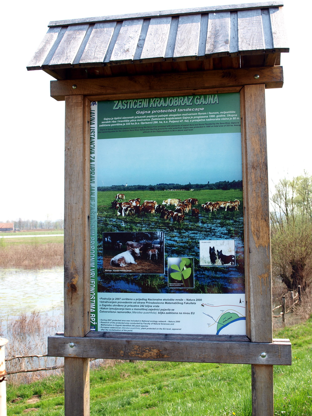 Ulaz u park prirode Gajna u selo Oprisavci, Brodsko-posavska županija.